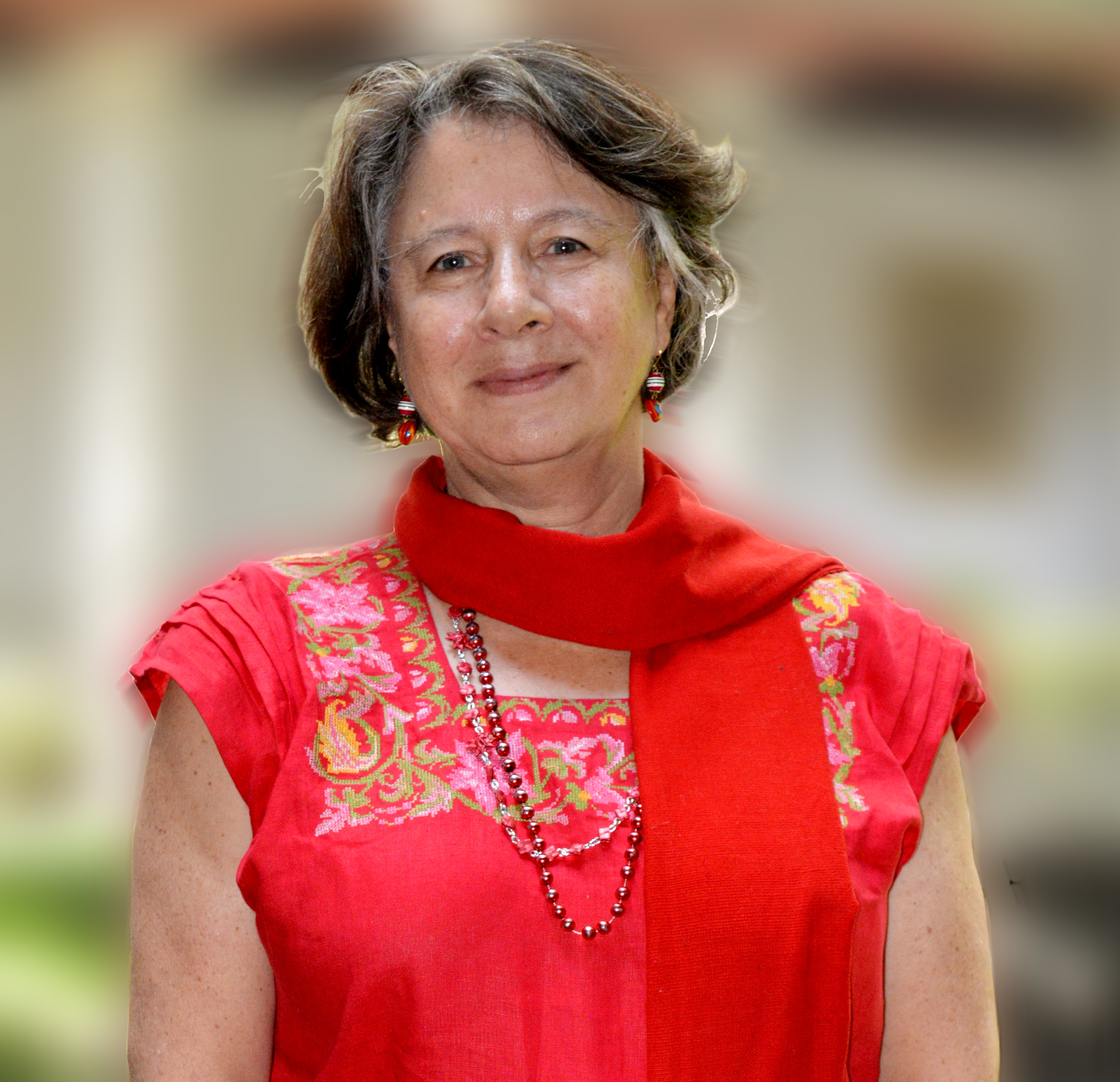 Fotografìa de Marta Turok en el Museo Franz Mayer